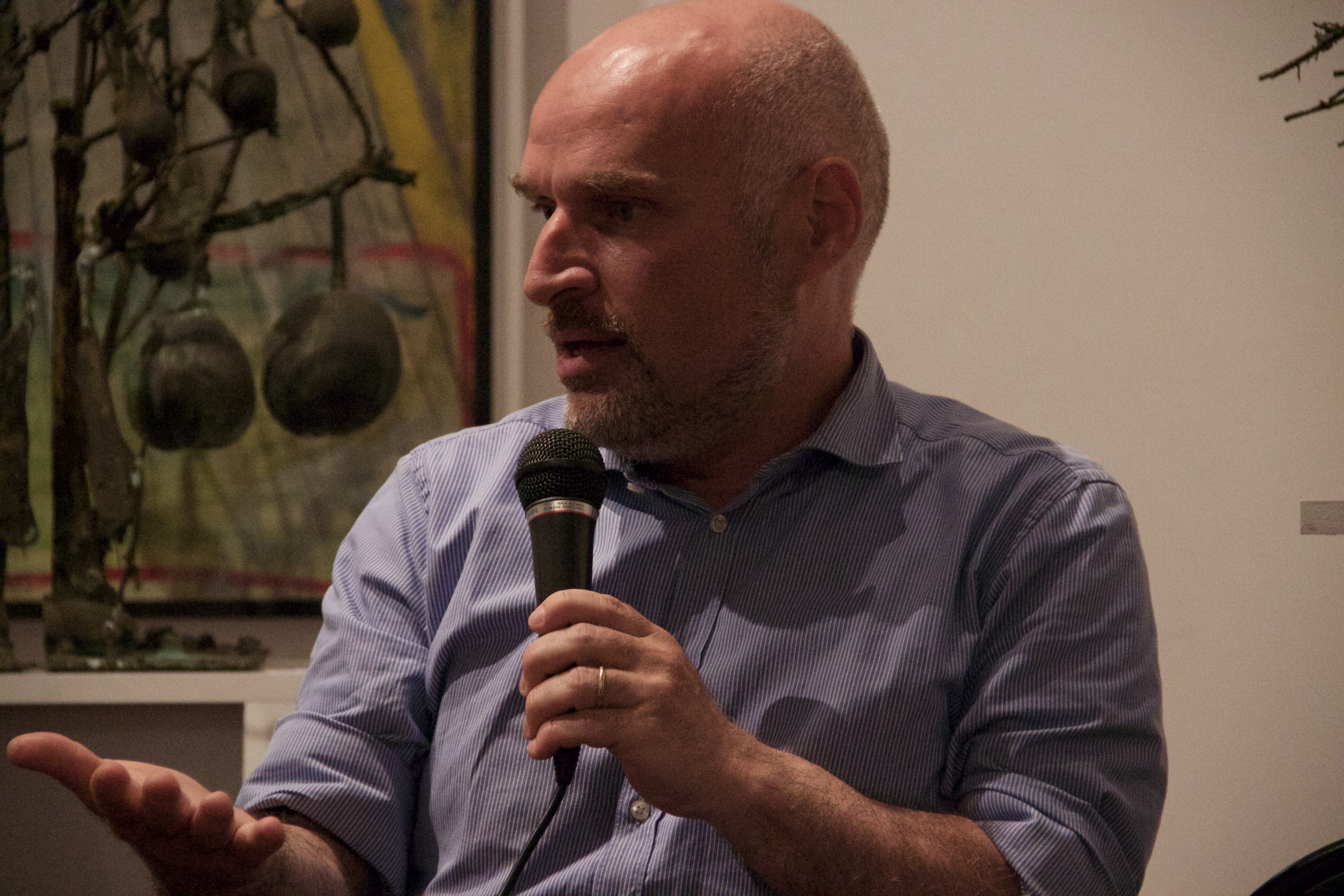 Daniel Fishman